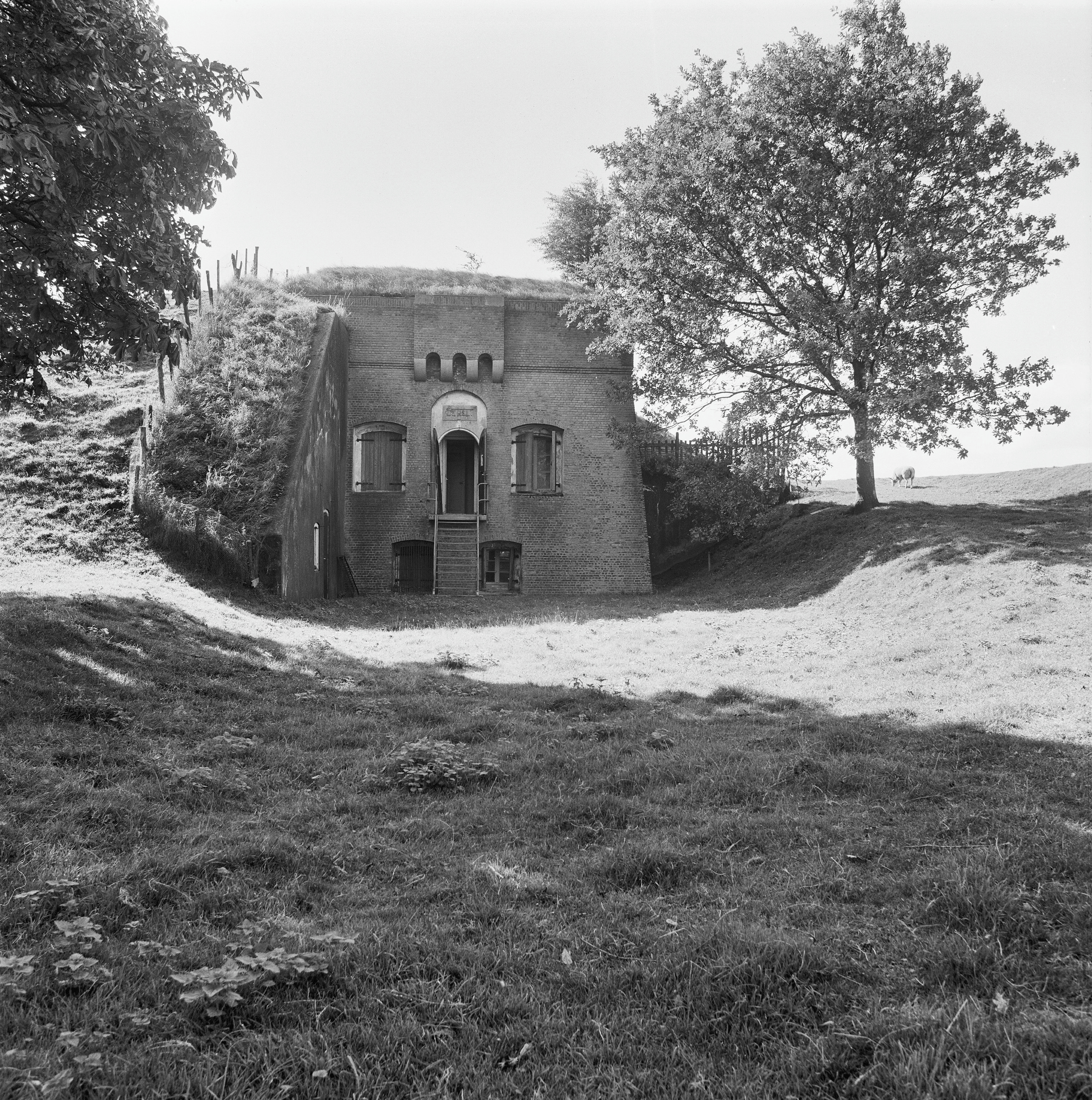 fort "De Hel", exterieur ingang